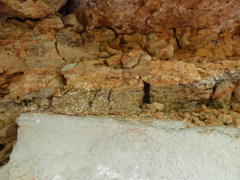 Прошарок львівської бентонітової глини. Прошарок львівської бентонітової лини на схилі гори Вовча